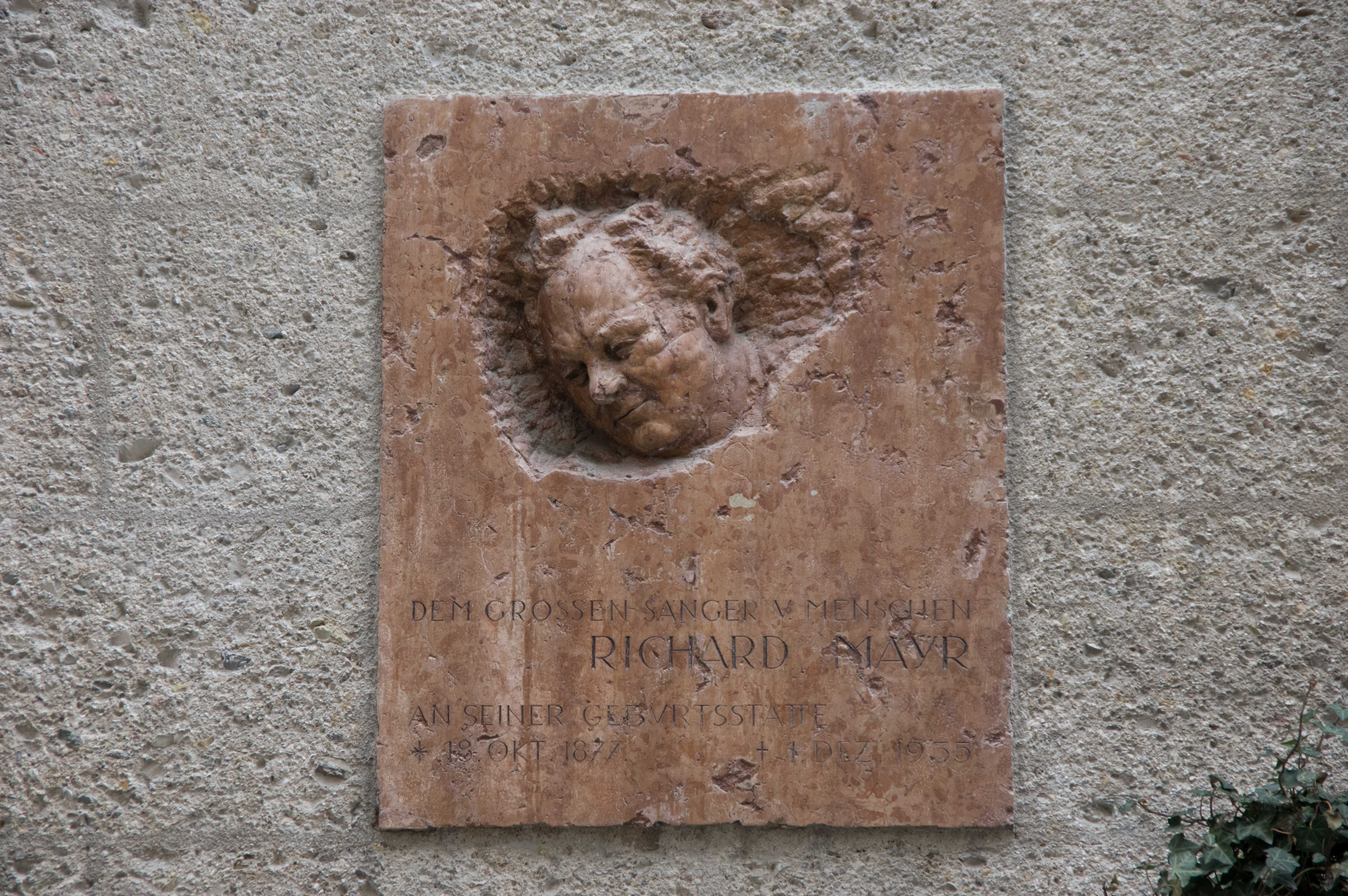 Salzburg in Österreich. Das Relief zeigt den Opernsänger Richard Mayr in der Linzer Gasse.